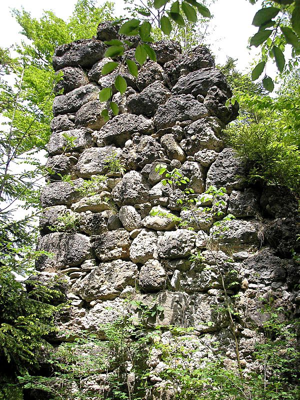 Burg Rauhlaubenberg bei Immenstadt im Allgäu (Landkreis Oberallgäu, Bayerisch-Schwaben). Der Wohnturm von Süden. Eigene Aufnahme, Mai 2008 / Rauhlaubenberg castle near Immenstadt im Allgäu (Landkreis Oberallgäu, Bavaria, Germany). The keep from the south. Own photo, May 2008